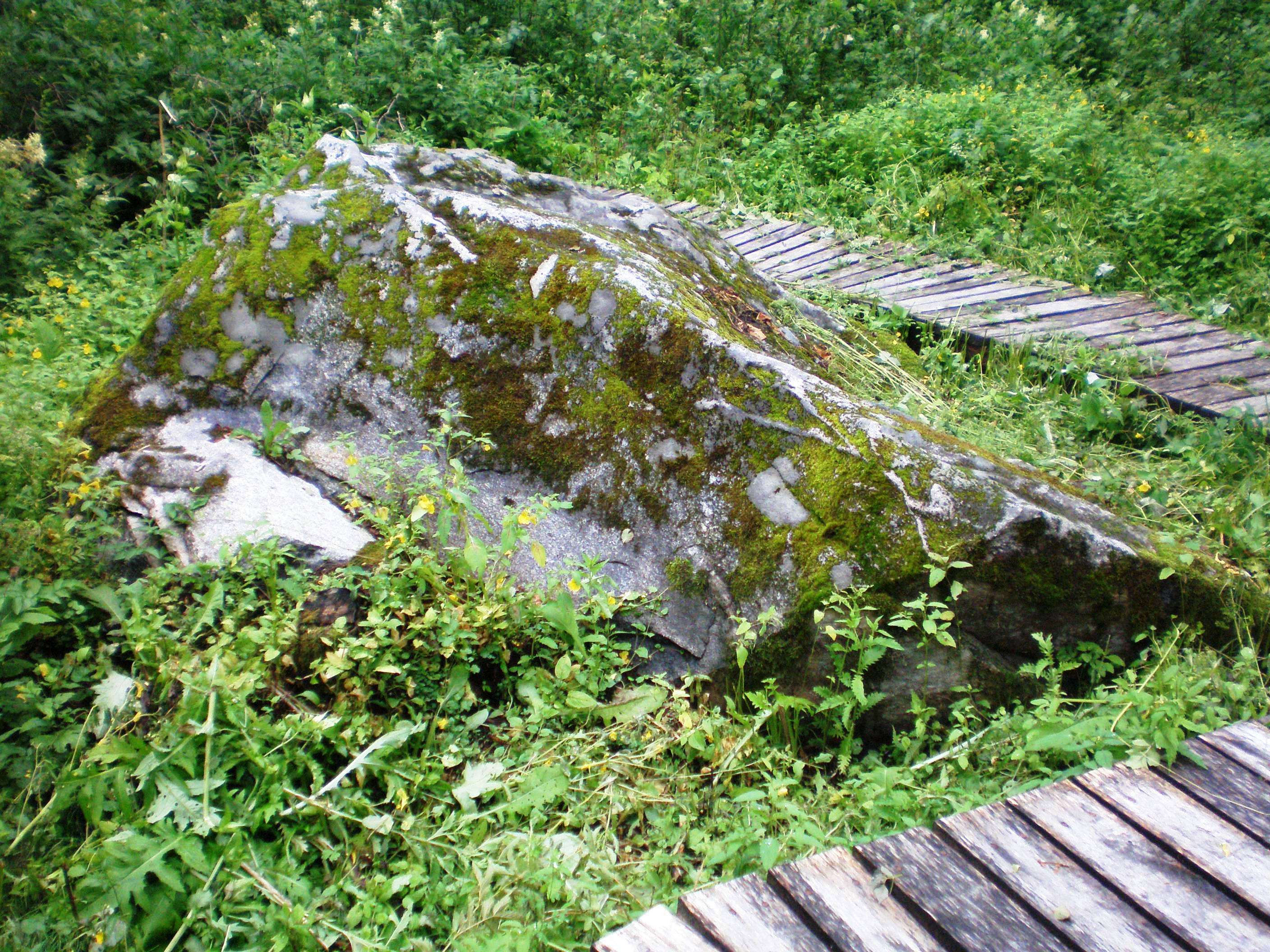 Žalpių mitologinis akmuo, Raseinių raj.